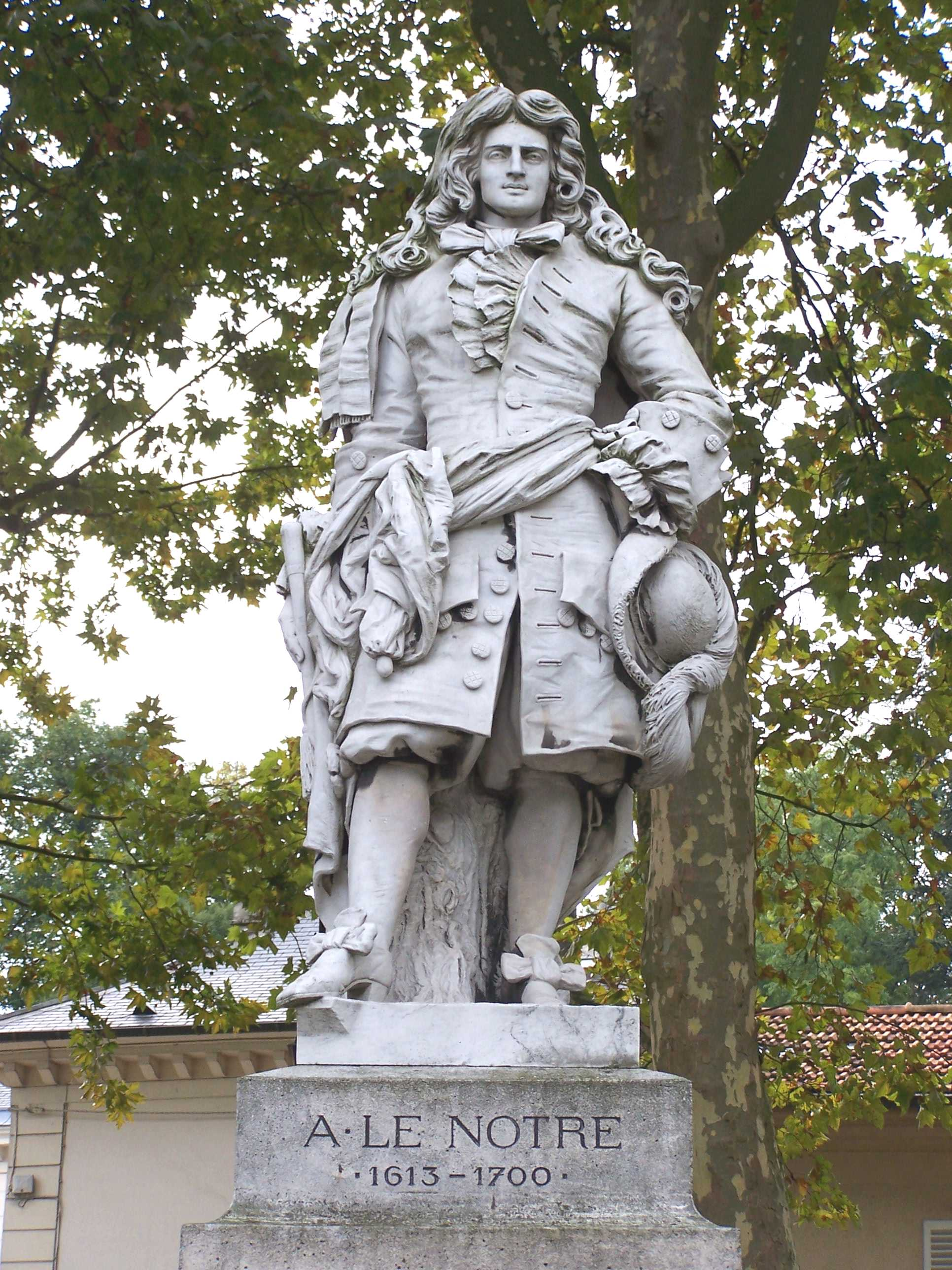 Statue de Le Nôtre à Versailles (Yvelines, France)